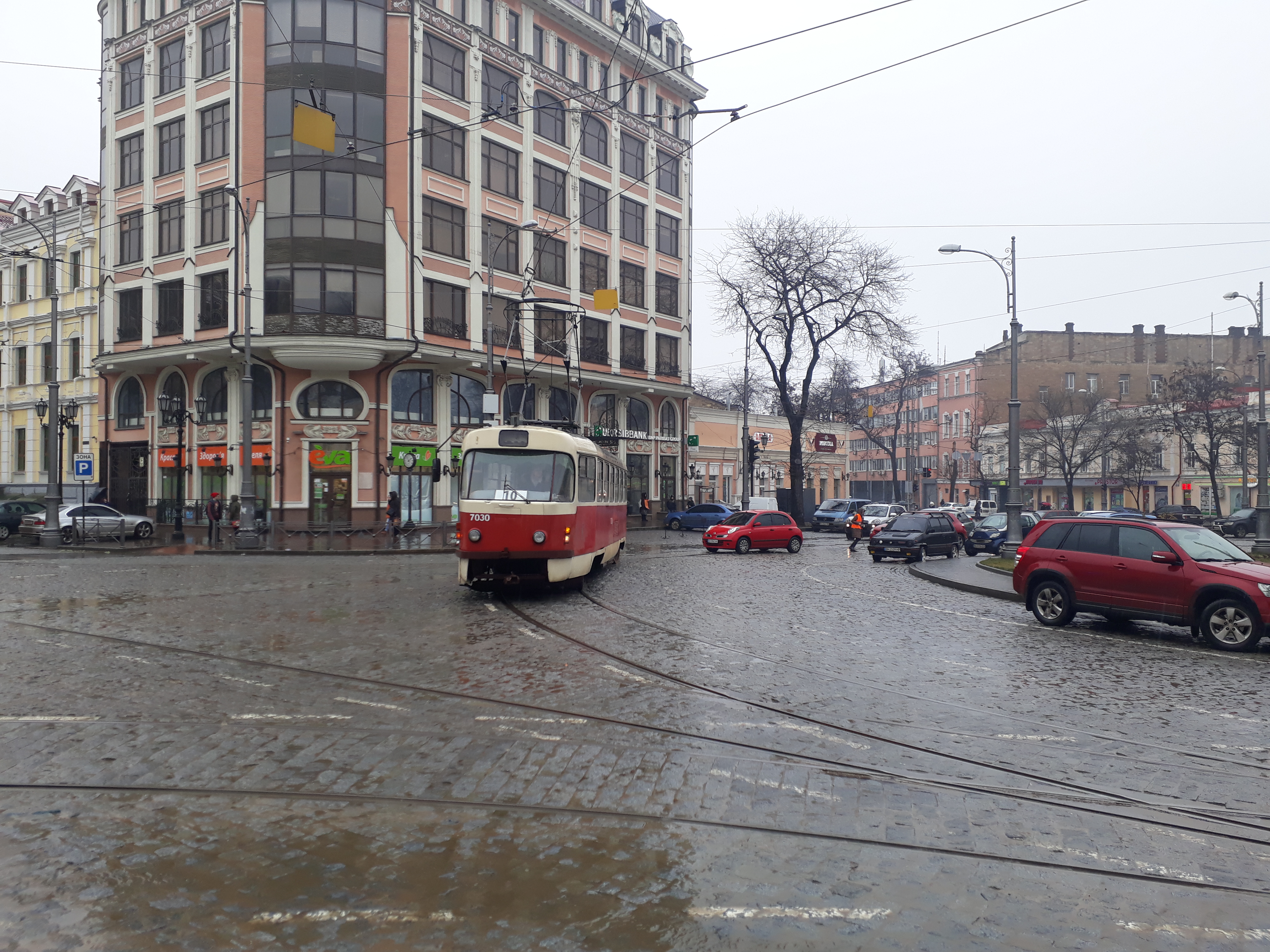 вагон 7030 на Тираспольской площади